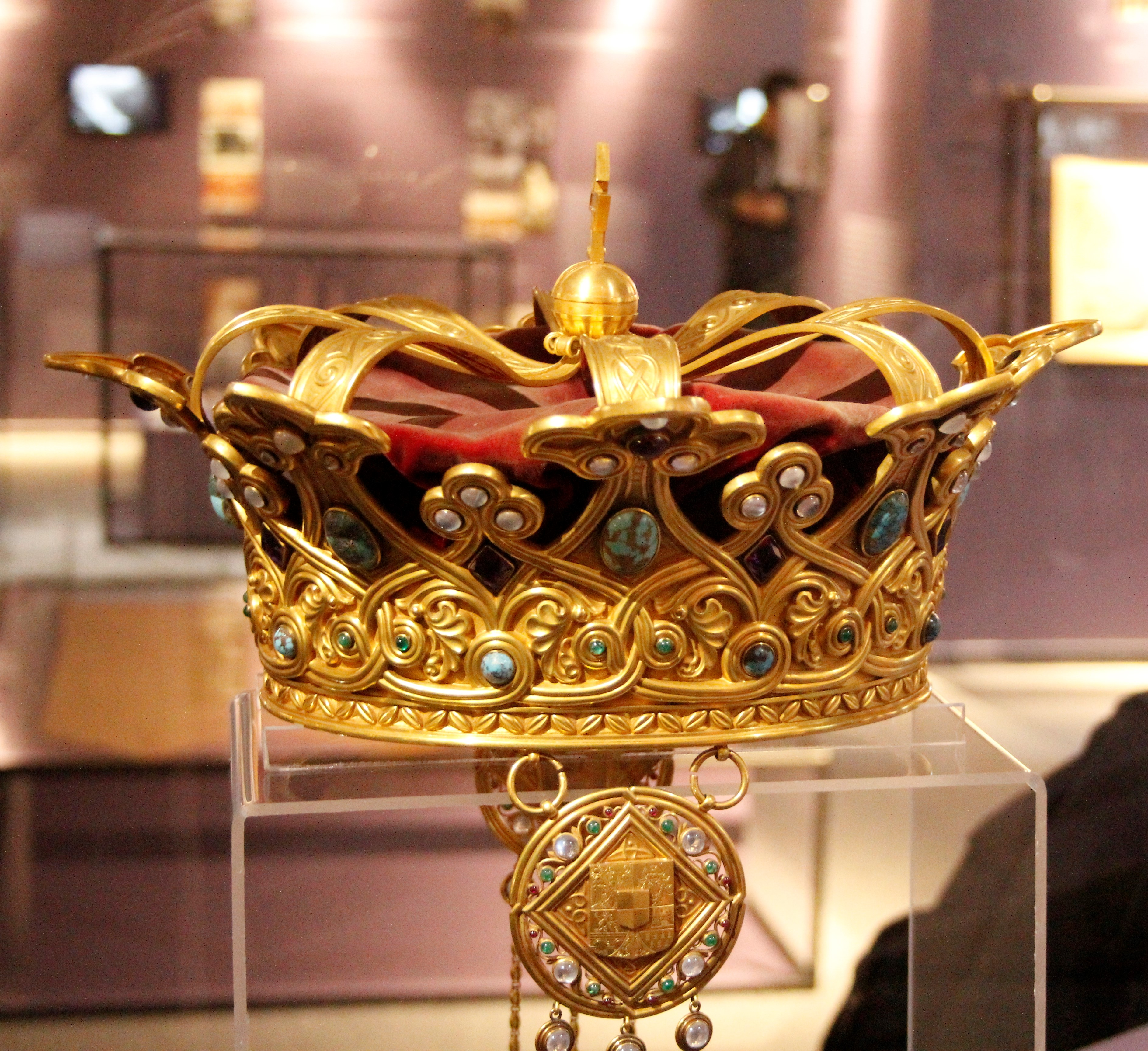 Corona della regina Maria di Romania, museo nazionale di storia della Romania, Bucarest